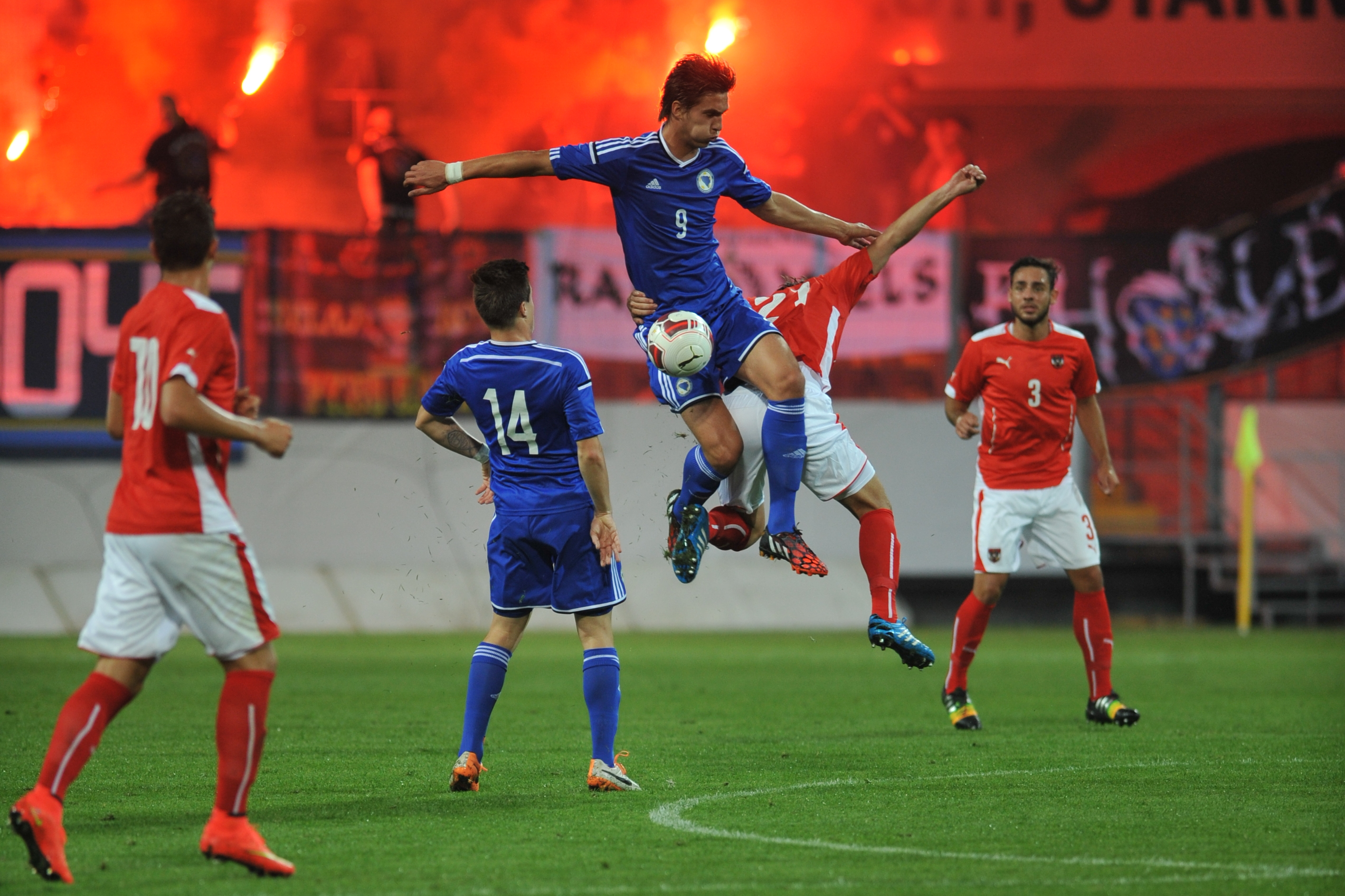 U21 EM Qualifikation Österreich gegen Bosnien und Herzegowina am 5. September 2014 in St. Pölten